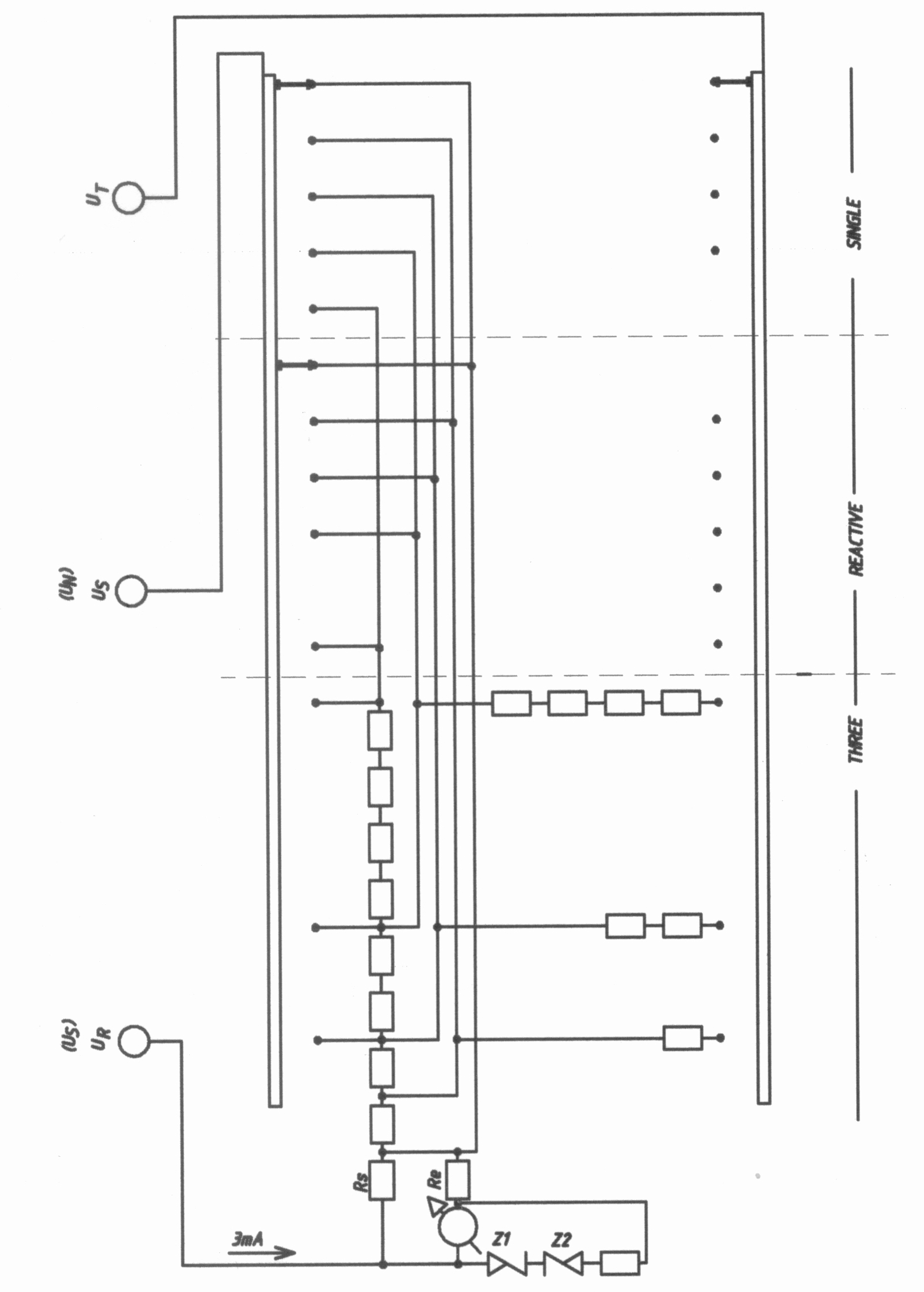 Elektrodinamikus multiméter feszültségágának elvi kapcsolási rajza, különös tekintettel a védelemre.